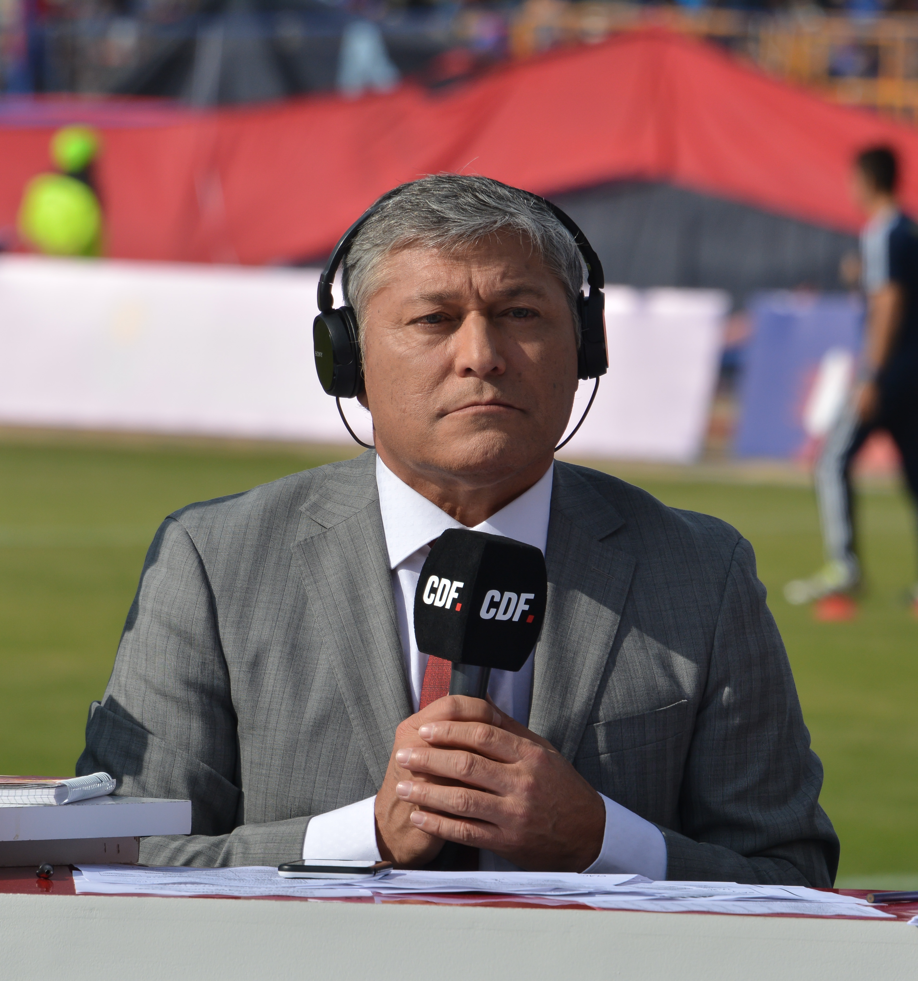 Patricio Yáñez, Universidad de Chile v Colo-Colo, Estadio Nacional, Santiago, Chile.